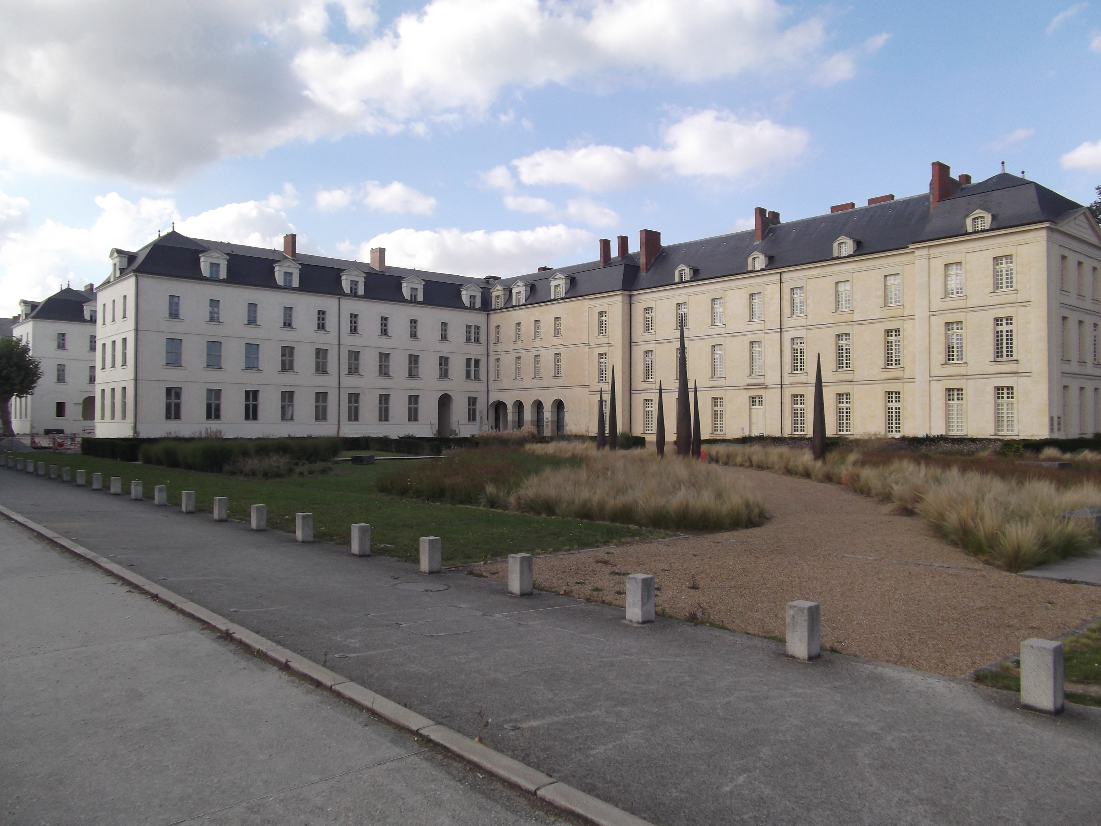 Couvent des ursulines abritant la Compa